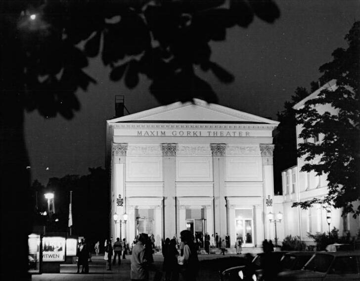 Berlin, Maxim-Gorki-Theater, Nacht ADN-ZB Senft 14.10.79 Berlin-Berliner Festtage-Das Maxim-Gorki-Theater, in dem am 13.10.79 zum erstenmal das Kathakali-Theater aus Indien auftrat.